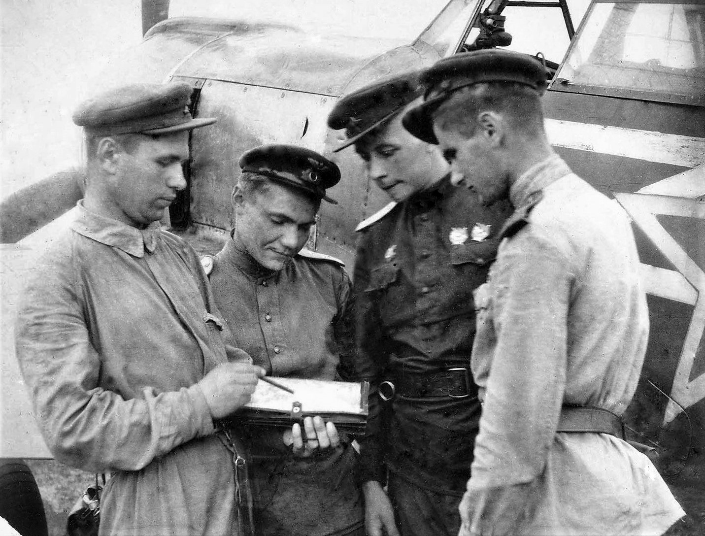 Командир 1-й эскадрильи 31-го истребительного авиационного полка старший лейтенант Н.М. Скоморохов (крайний слева) ставит боевую задачу лётчикам своей эскадрильи. Слева направо: лейтенант Б. С. Горьков (Борис Сергеевич Горьков, 1922 г.р., уроженец города Москва, за годы войны совершил 250 боевых вылетов, в 58 воздушных боях сбил 12 самолётов противника), лейтенант В.В. Кирилюк (23 февраля 1945 года Виктору Васильевичу Кирилюку будет присвоено звание Героя Советского Союза) и лейтенант В.И. Калашонок (1922 г.р., уроженец деревни Старино Минской области Белорусской ССР, за годы войны совершил свыше 300 боевых вылетов, в воздушных боях одержал не менее 5 личных побед)